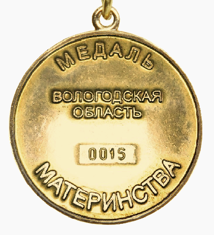 Медаль Вологодской области «Медаль материнства» 1 степени (реверс)